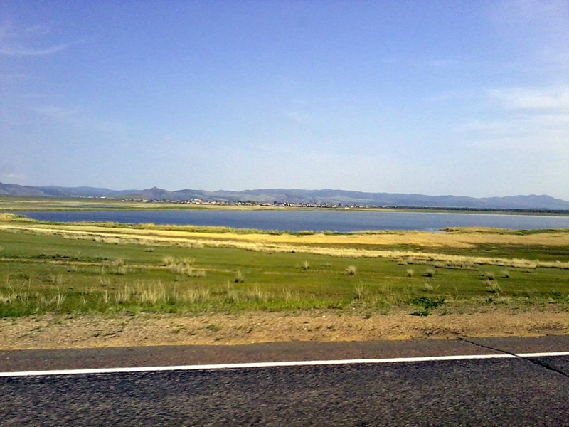 Озеро Саган-Нур (Белое озеро). Оронгойская долина.